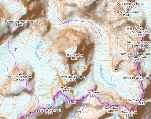 carte réalisée sur umap This map may be incomplete, and may contain errors. Don't rely solely on it for navigation.